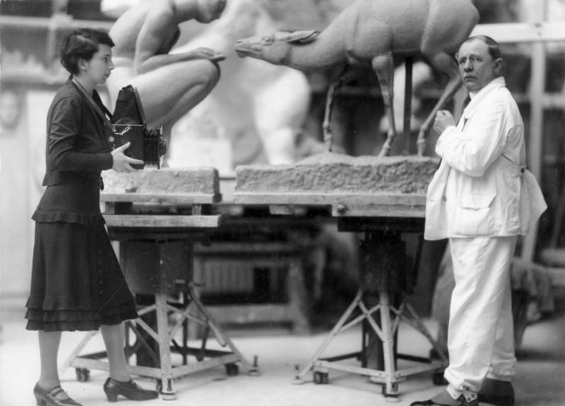 Scherl Bilderdienst Prof. h.c. Hugo Lederer 22539-30